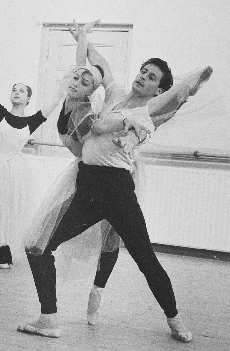 Collectie / Archief : Fotocollectie Anefo Reportage / Serie : [ onbekend ] Beschrijving : Repetitie Nederlands Ballet. Leonie Kramer en Job Sanders Annotatie : Repetitie van het ballet Etudes van Harald Lander t[premiere 15-6-1916 Stadsschouwburg Utrecht] Datum : 14 juni 1961 Trefwoorden : ballet, dansen Persoonsnaam : Kramer, Leonie, Sanders, Job Fotograaf : Lindeboom, Henk / Anefo Auteursrechthebbende : Nationaal Archief Materiaalsoort : Negatief (zwart/wit) Nummer archiefinventaris : bekijk toegang 2.24.01.03 Bestanddeelnummer : 912-6025